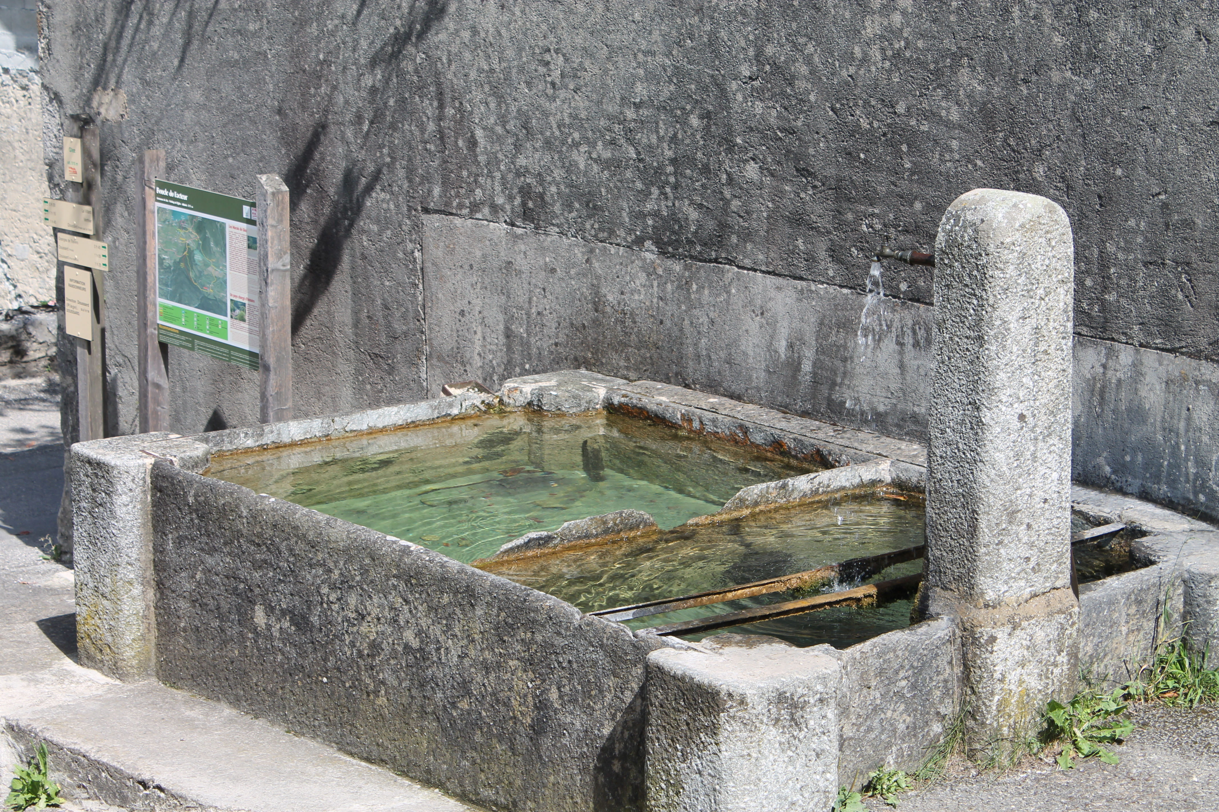 Bassin sur le chemin du château, commune française de Giez (Haute-Savoie).